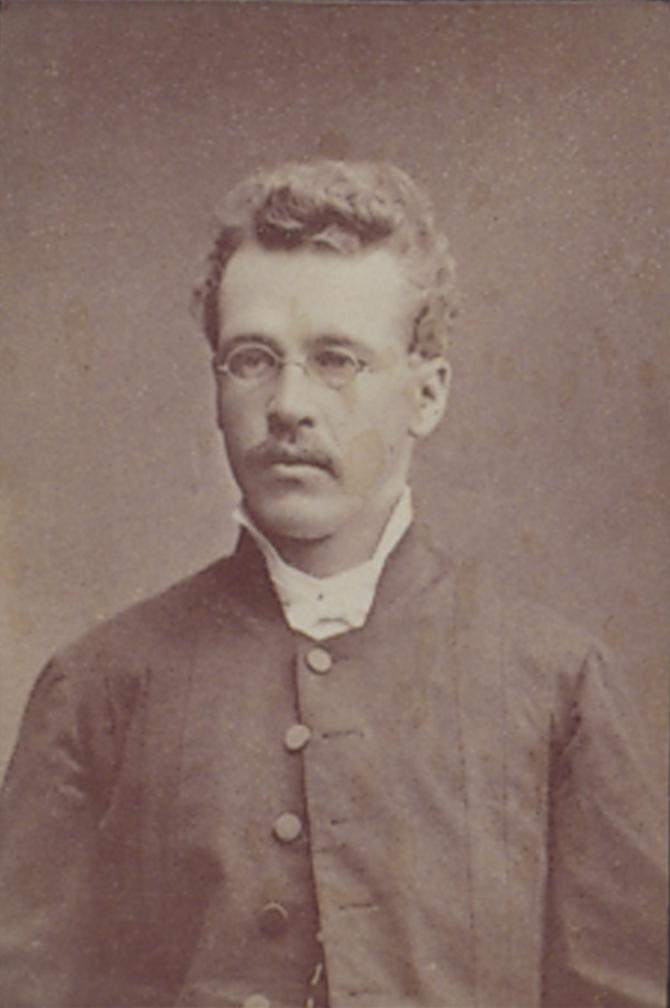 Pastor Johannes Bäck (1850−1901). This work is in the public domain in its country of origin and other countries and areas where the copyright term is the author's life plus 70 years or less. You must also include a United States public domain tag to indicate why this work is in the public domain in the United States. Note that a few countries have copyright terms longer than 70 years: Mexico has 100 years, Jamaica has 95 years, Colombia has 80 years, and Guatemala and Samoa have 75 years. This image may not be in the public domain in these countries, which moreover do not implement the rule of the shorter term. Côte d'Ivoire has a general copyright term of 99 years and Honduras has 75 years, but they do implement the rule of the shorter term. Copyright may extend on works created by French who died for France in World War II (more information), Russians who served in the Eastern Front of World War II (known as the Great Patriotic War in Russia) and posthumously rehabilitated victims of Soviet repressions (more information). This file has been identified as being free of known restrictions under copyright law, including all related and neighboring rights.